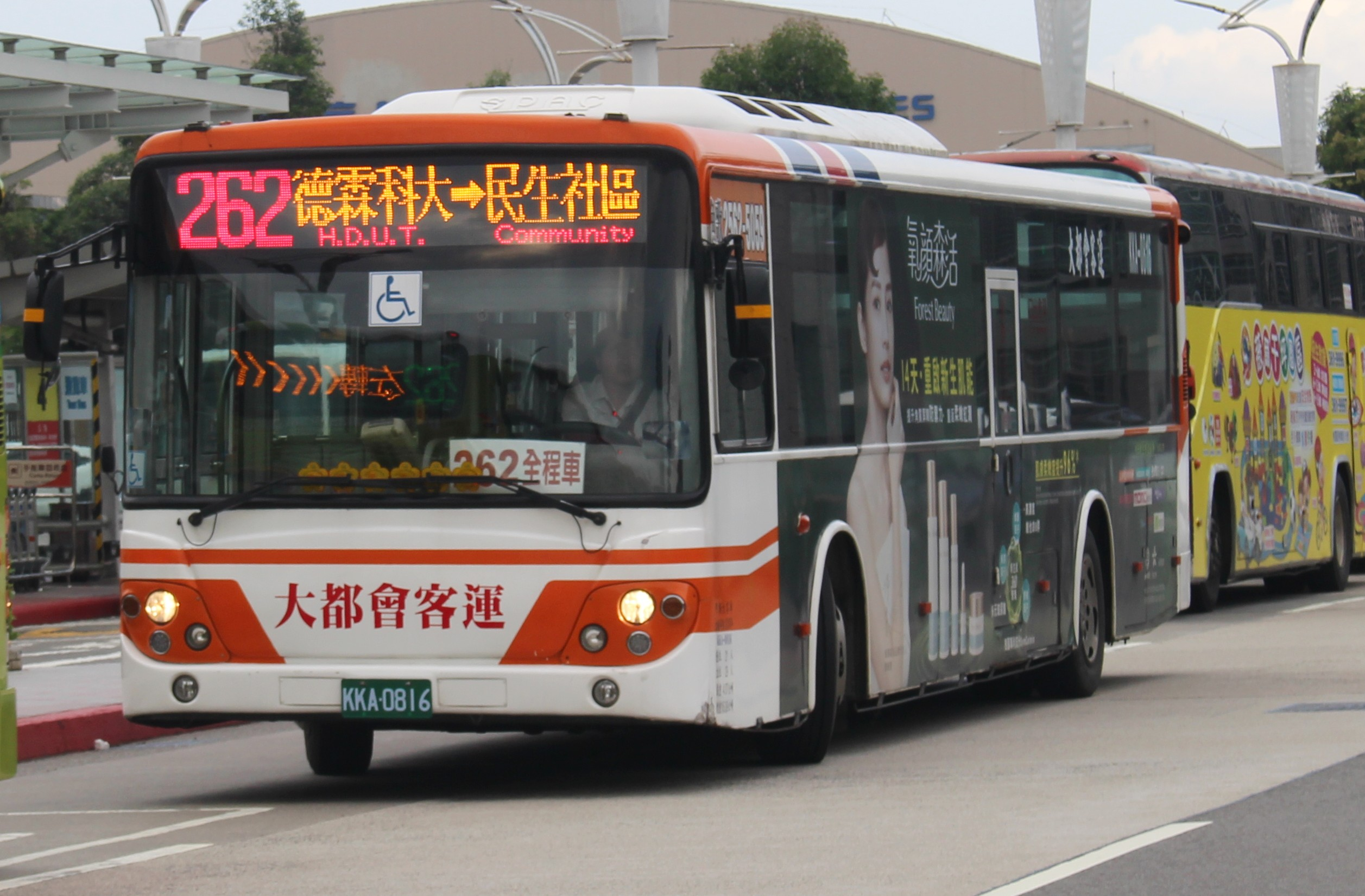 大都會客運2010 DAEWOO BS120CN KKA-0816 262